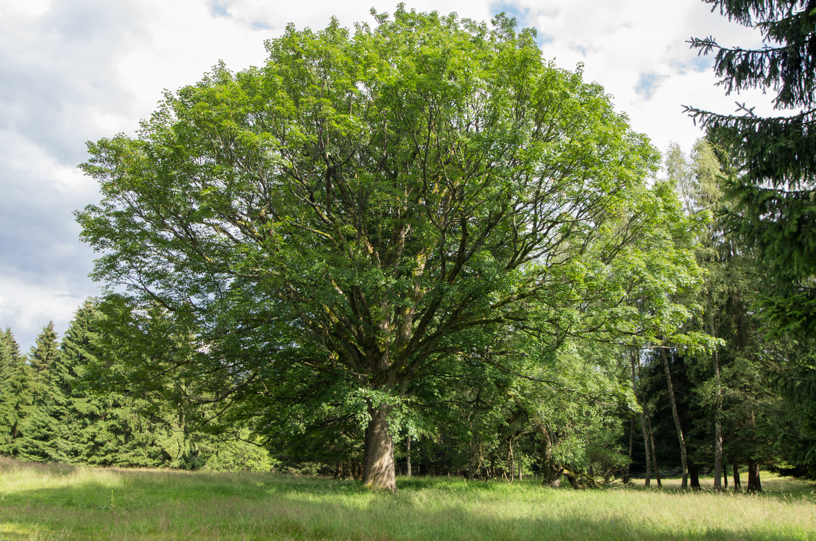 významný strom Javor klen pod skalkou, na odlesněné plošině pod Dvorským vrchem (Hofbergem 839 m), Nové Hamry, okres Karlovy Vary